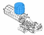 Херметизиран товарен модул